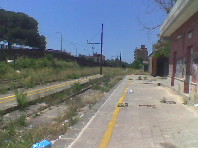 Foto della banchina della Stazione di Boscoreale